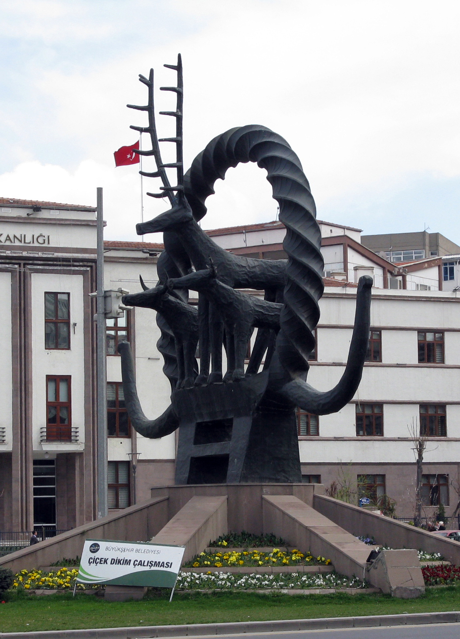 "Хеттский монумент". Анкара, бульвар Ататюрка.